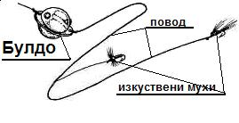 Монтаж на булдо